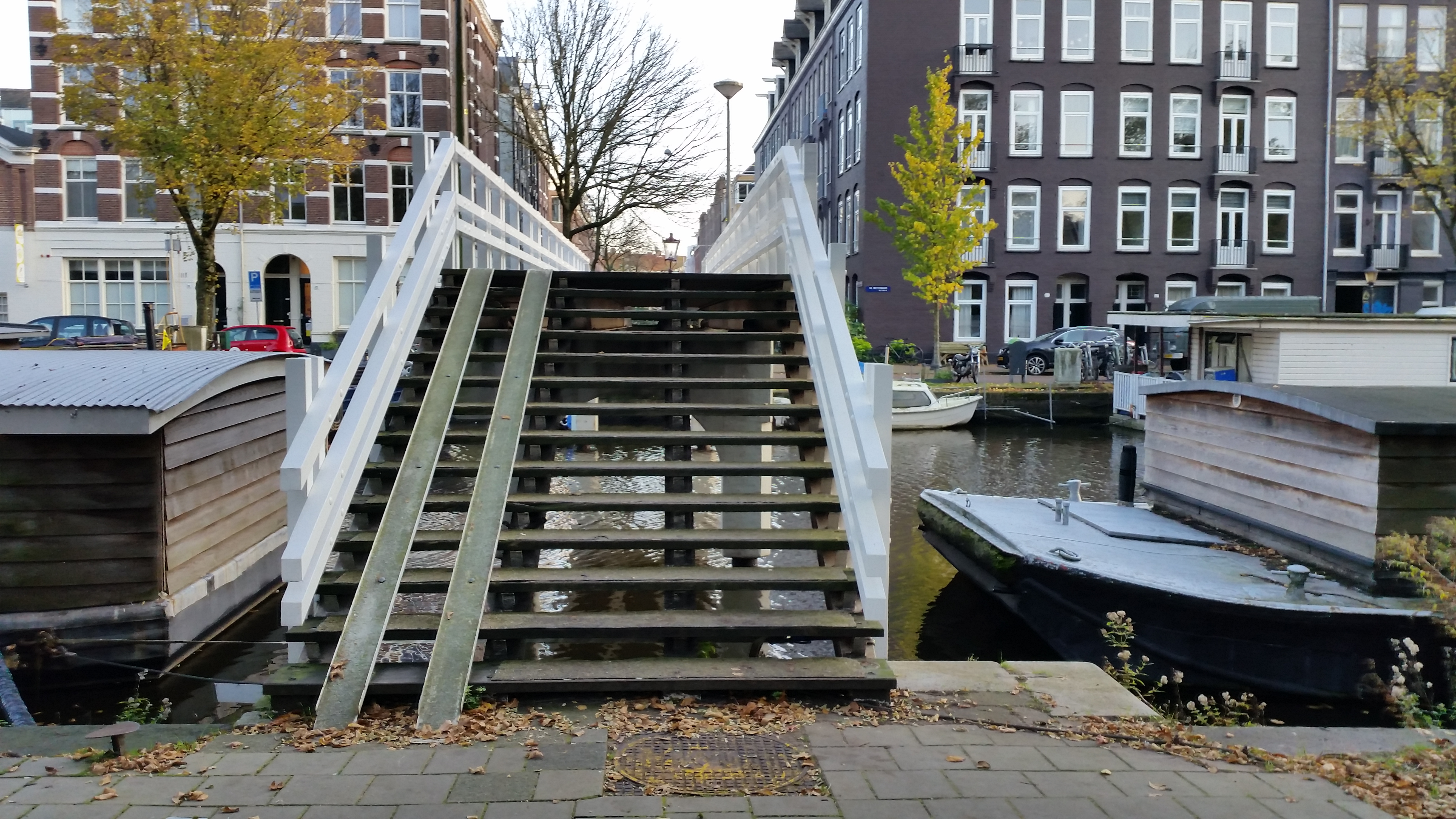 Overzicht naar Brug 1902 (in Amsterdam)